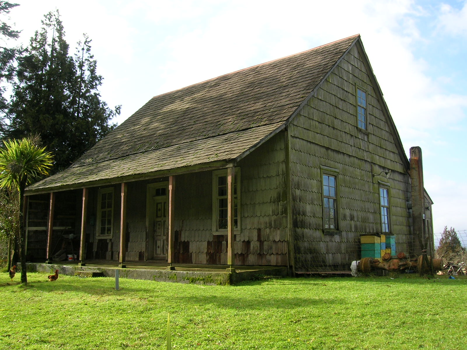 Casa de madera y Tejuela, Primera Etapa Colonización Alemana, Camino a Alerce, Puerto Varas